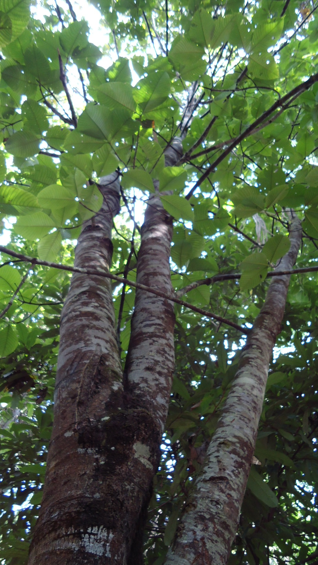 Árbol de 18m de Alt. Tronco de 18.7cm de DAP. Presenta látex, sabor dulce. Posee hojas compuestas trifoliadas. Forma elíptica. Longitud 30cm. Ancho 16cm. Ápice acuminado. Haz de color verde. Envés de color verde pálido. Margen lisa.